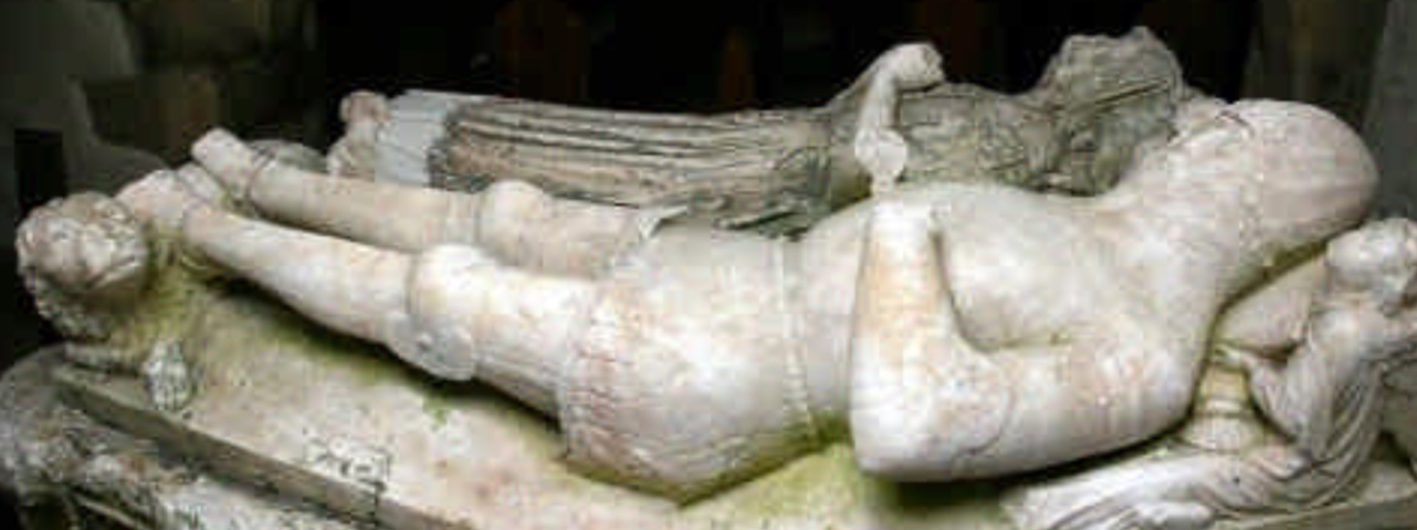 Corffddelw Goronwy ap Tudur a’i wraig Morfudd, Eglwys Penmynydd, Môn